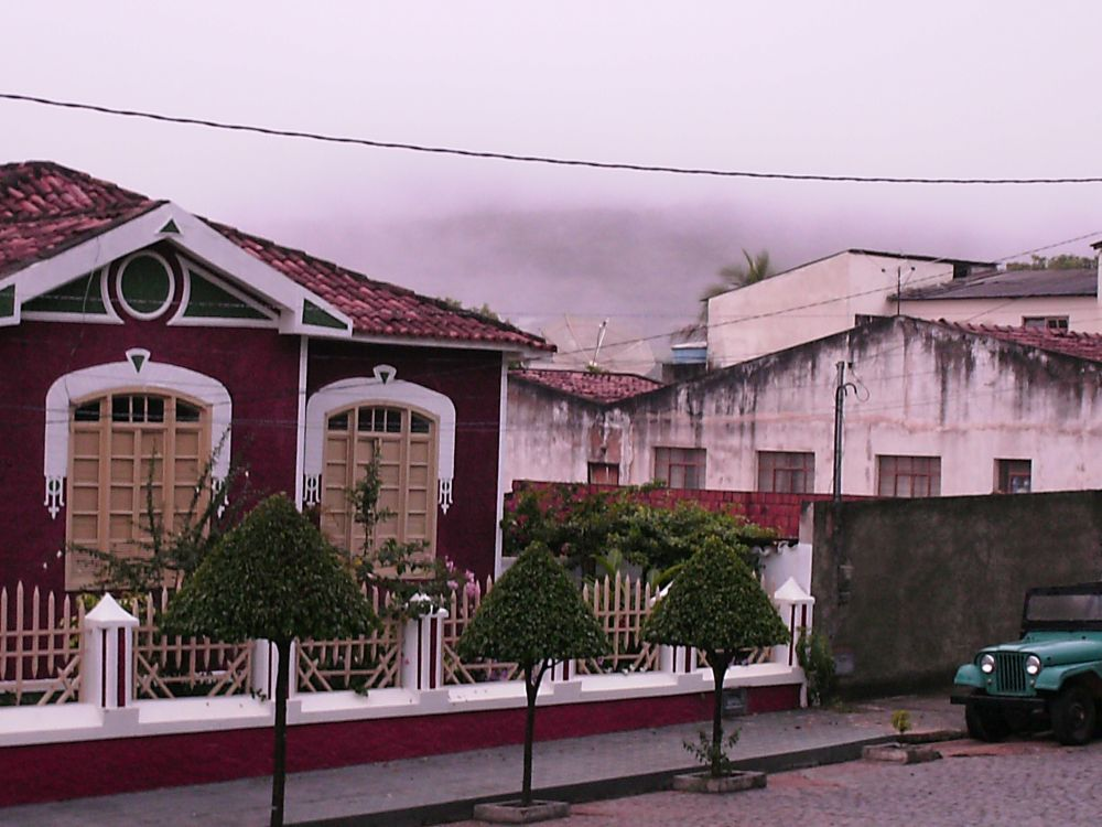 Fog in Caetité